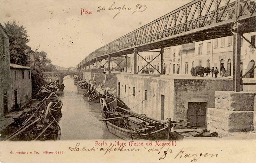 Pisa, viadotto tranviario sugli scali del sale